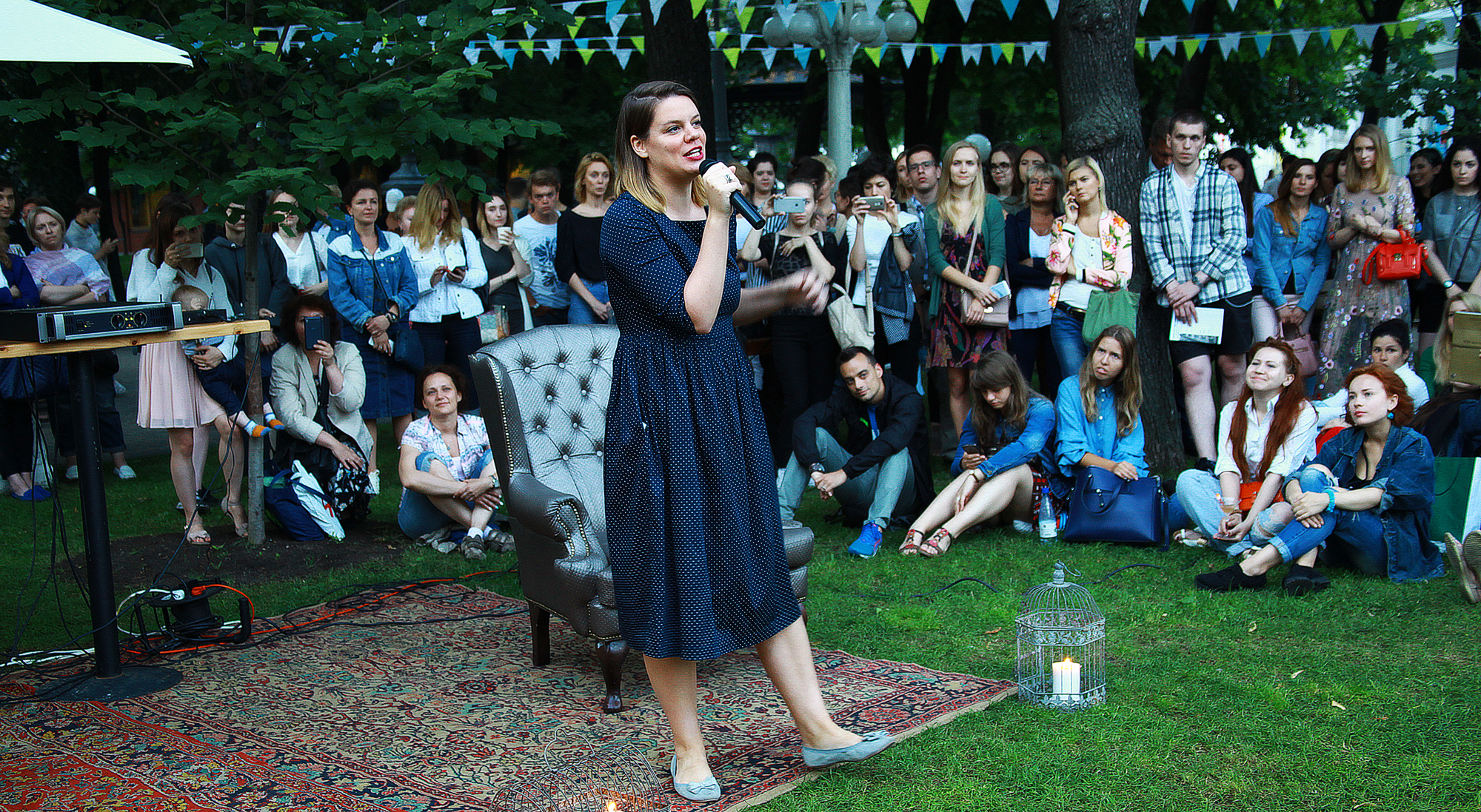 Встреча нового главреда "Искусства кино" с читателями журнала в саду Эрмитаж